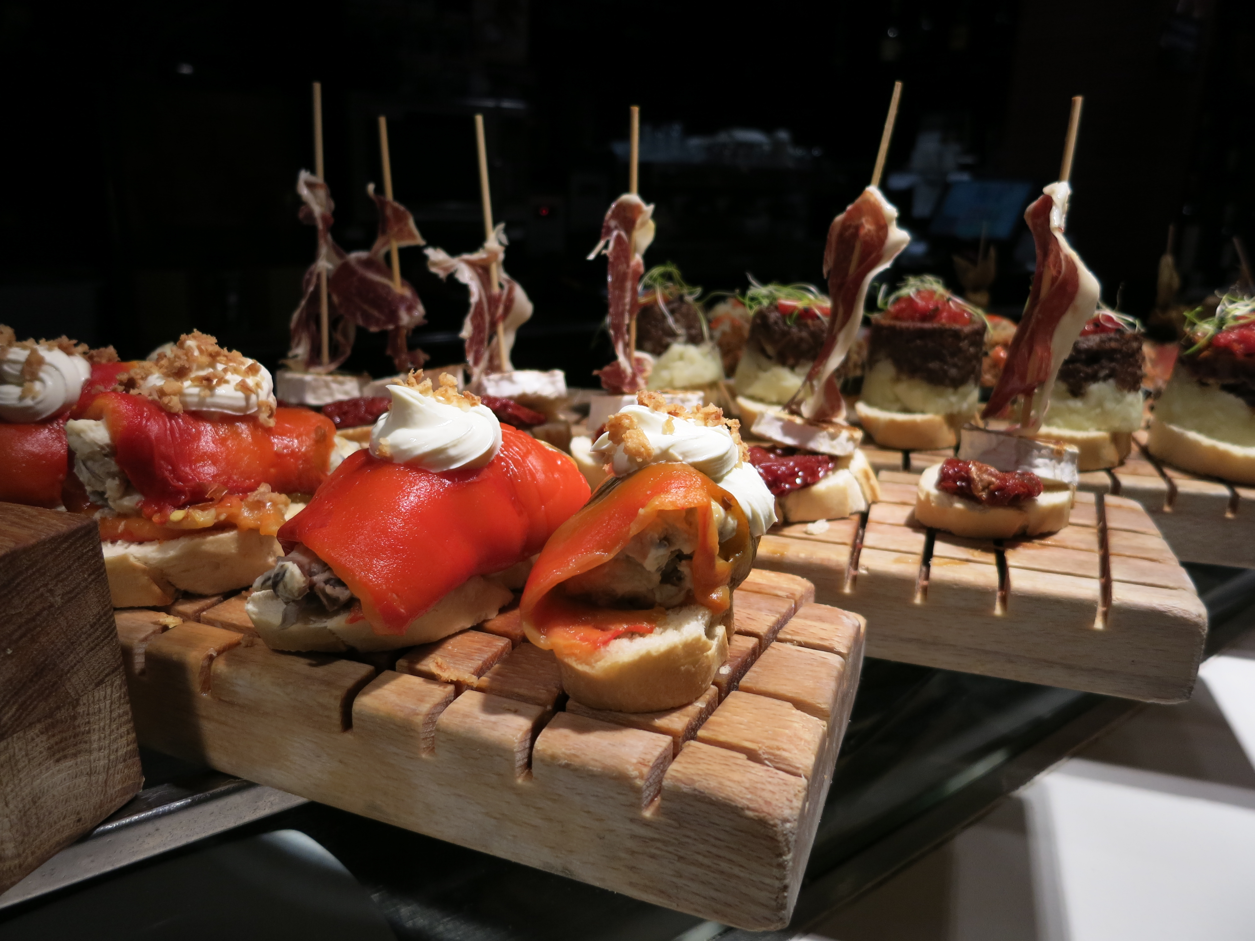 Pinchos en un bar de Vitora-Gasteiz, Álava, País Vasco, España